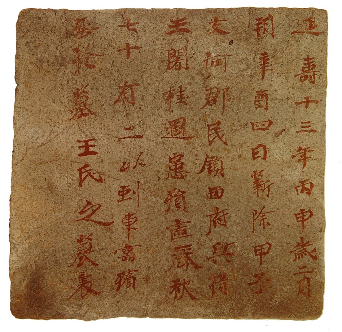 高昌延寿十三年，王阇桂墓志，书丹未刻。